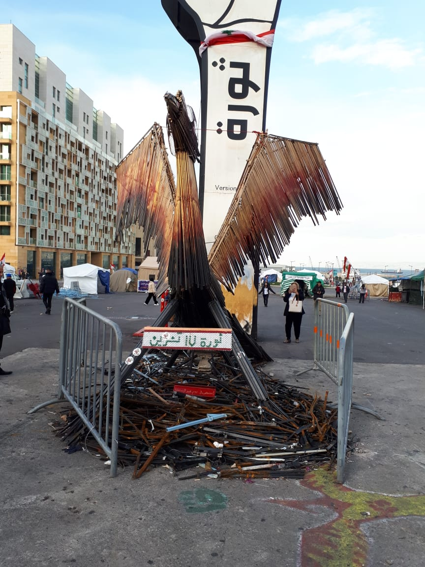 "Der Flugdes Phönix (Anspielung auf die Phönizier), Objektkunst auf dem Beiruter Märtyrerplatz währen der Proteste im Libanon Dezember 2019. Verwendet wurden u.a. Zeltstangen, die bei den Angriffen auf die Demonstranten durch Hisbollah- und Amal-Anhänger zerstört wurden.